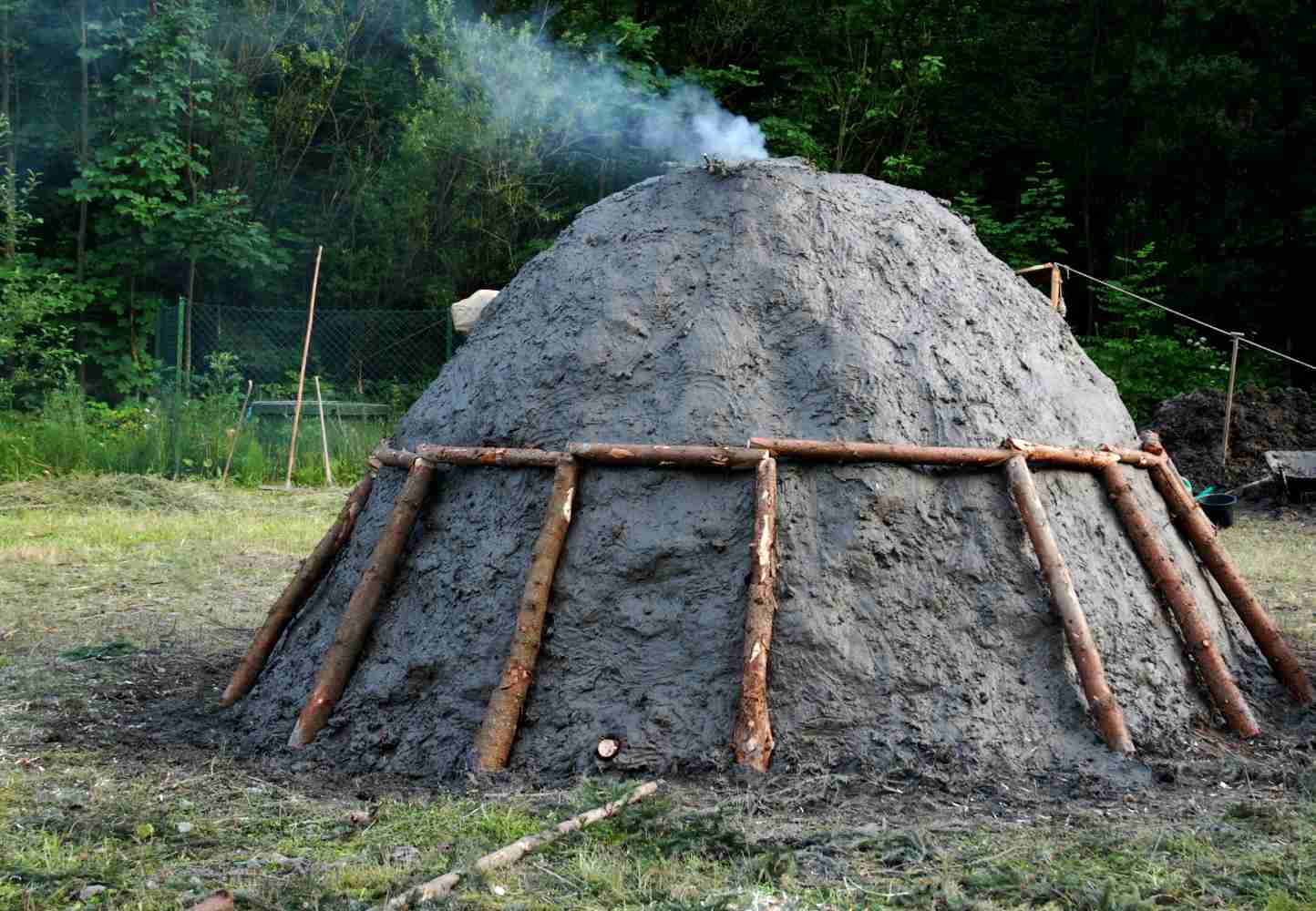 Hořící milíř v obci Košařiska v roce 2009